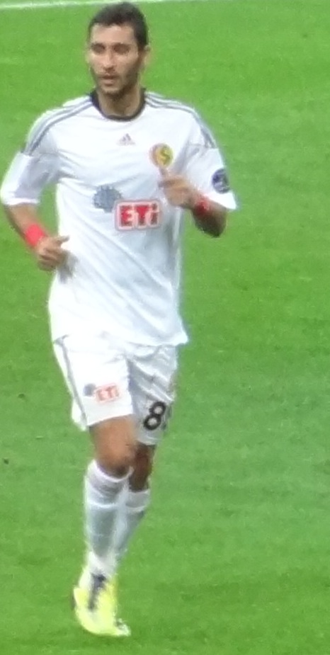 Veysel G.Saray maçında